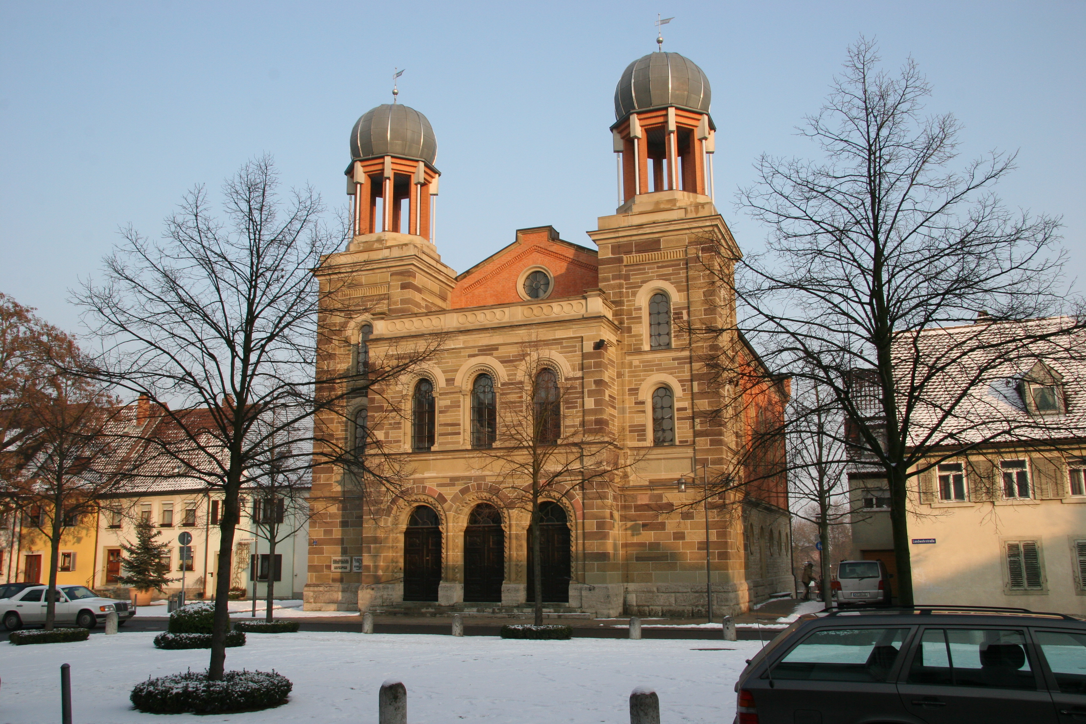 Die Alte Synagoge in Kitzingen